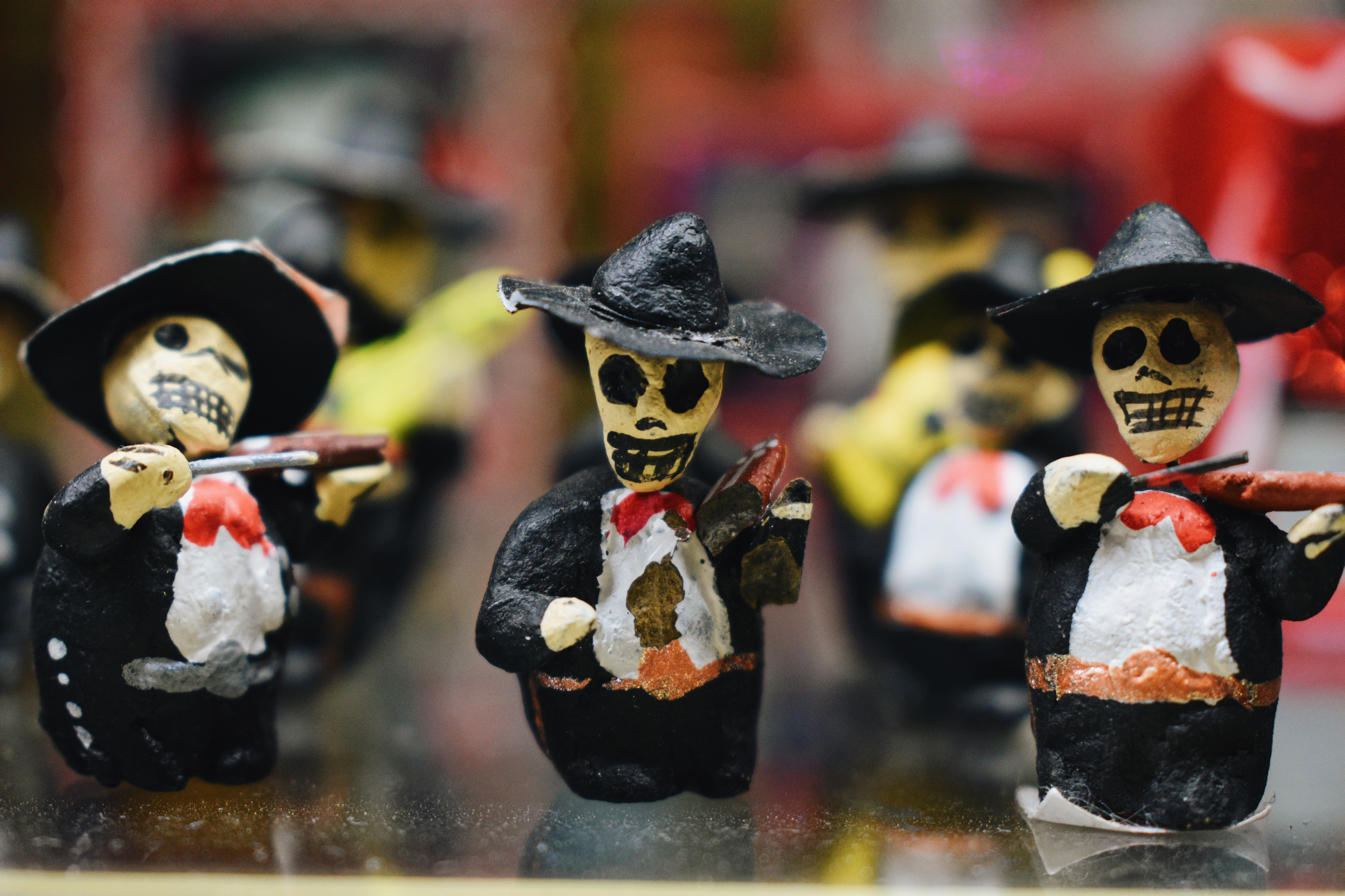 Artesanías mexicanas de catrines vestidos de mariachis en una tienda de artesanías en San Miguel de Allende, Guanajuato, México.